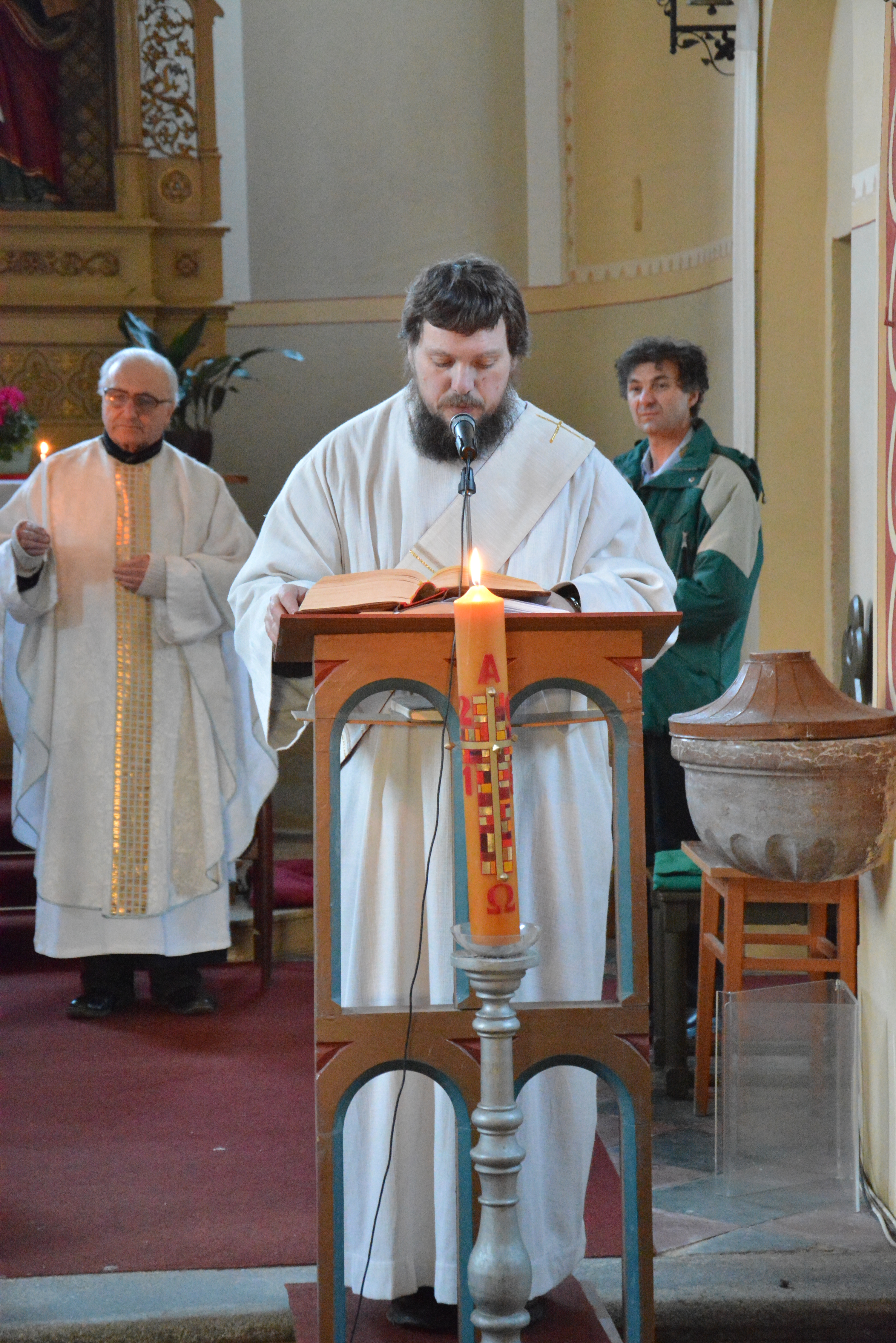 o Velikonocích 2015 v kostele v Hartvíkově